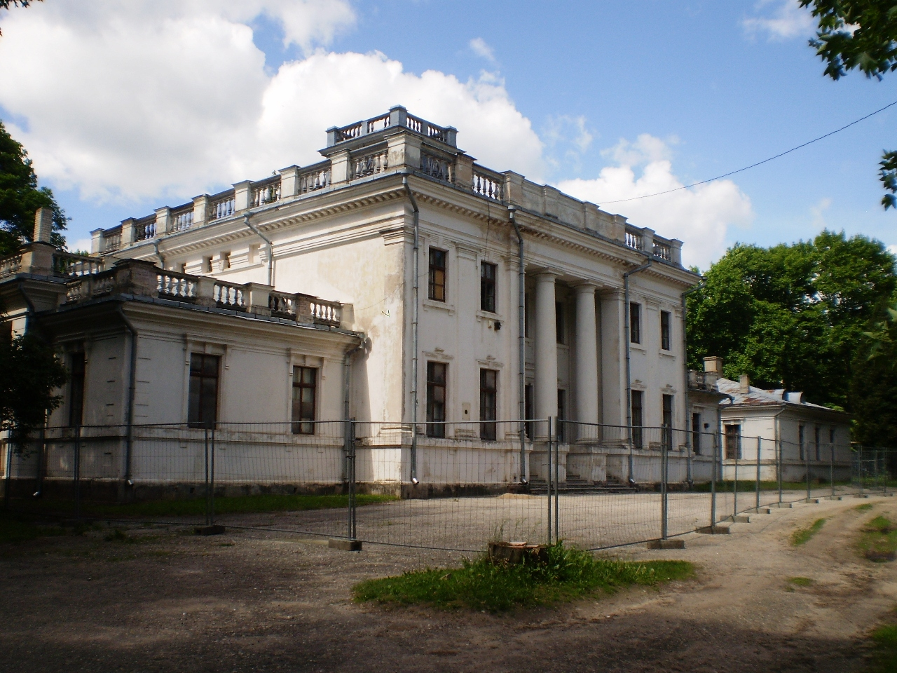 Lančiūnavos dvaras, Kėdainių raj.